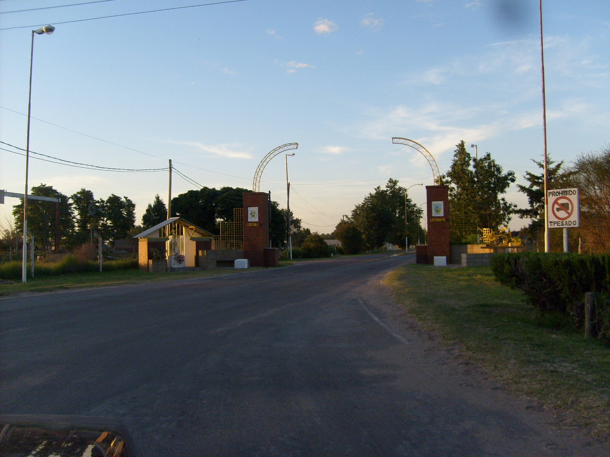 Acceso a Catriló - La Pampa, Sobre ruta nacional 5